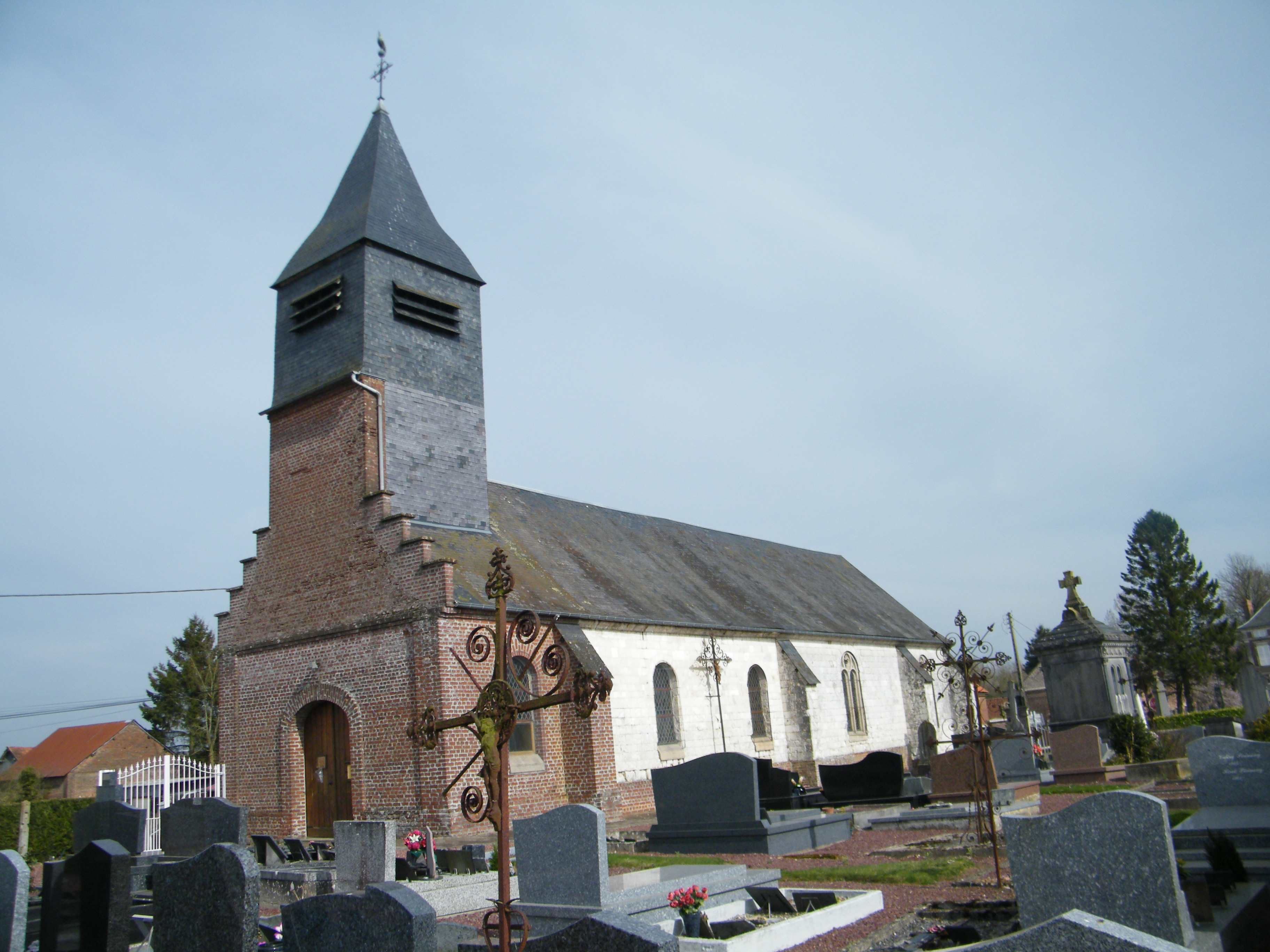 L'église Saint-Léger de Domléger.